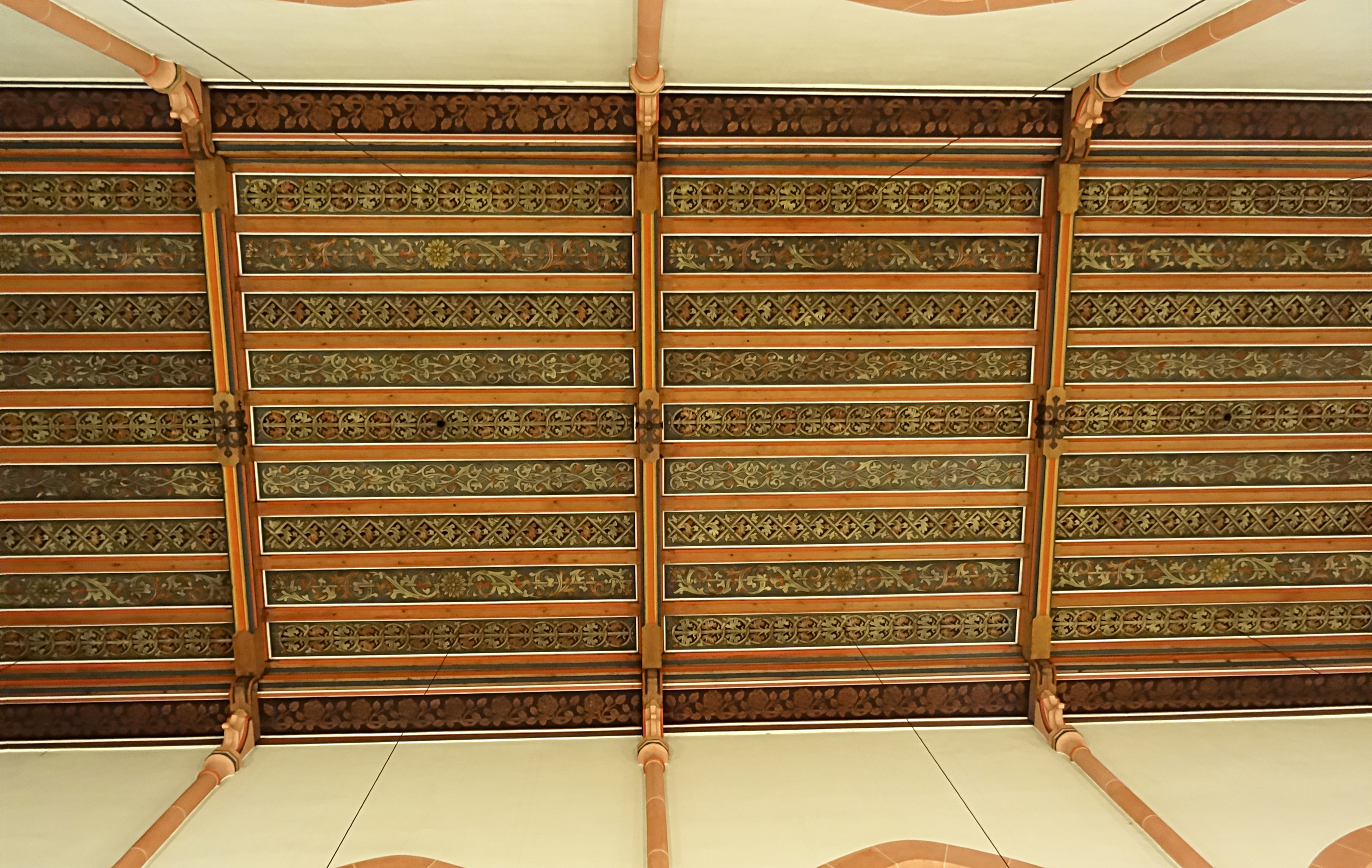 Kassettendecke von 1894 in der Pfarrkirche St. Bonifatius Apolda